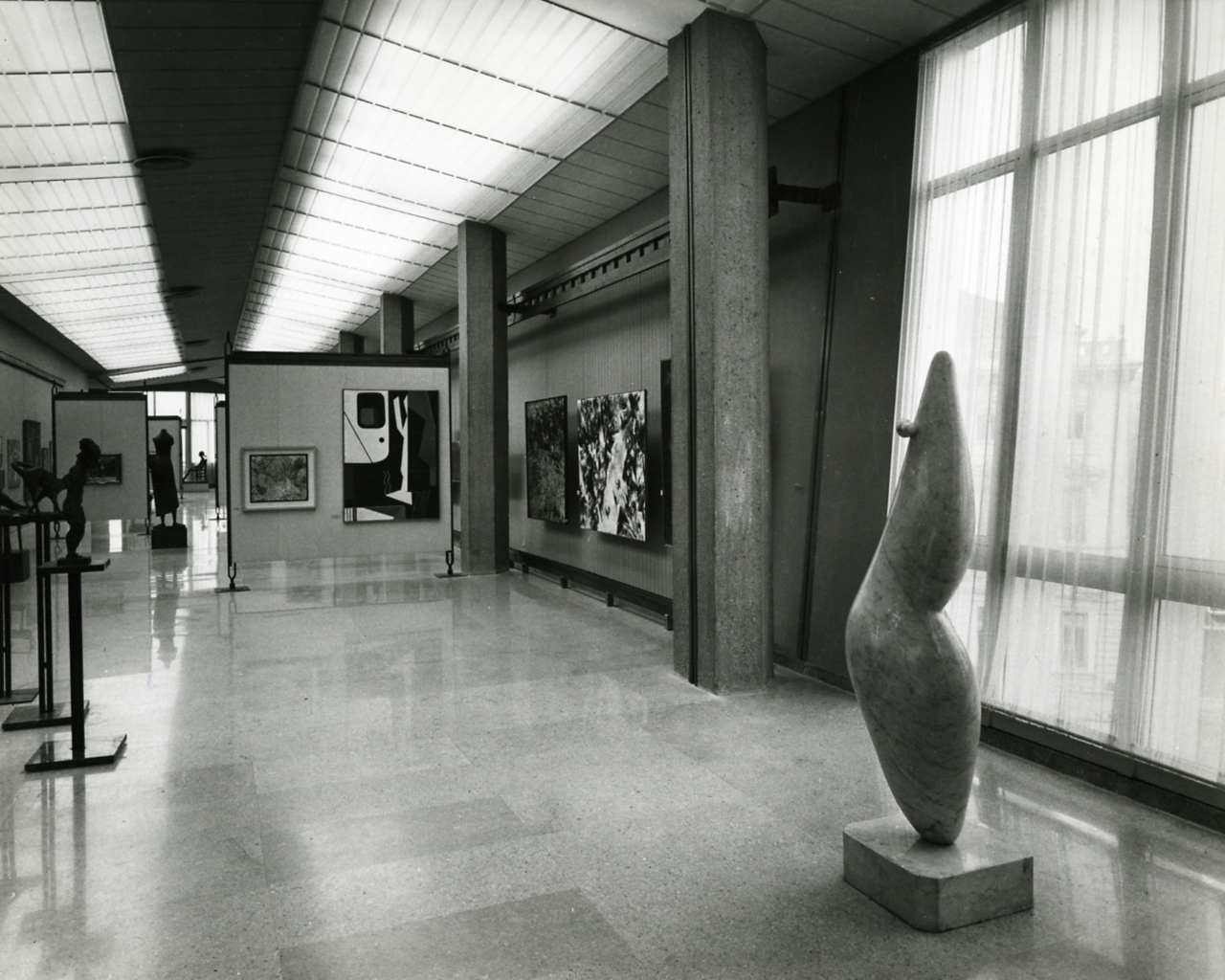 Servizio fotografico : Torino, 1959 / Paolo Monti. - Stampe: 4 : Positivo b/n, gelatina bromuro d'argento/ carta, 24x30. - ((Al verso delle stampe manoscritti i numeri dei negativi corrispondenti secondo altra numerazione progressiva con cui sono state numerate le buste contenenti i negativi?: 2, 7, 12, 21.; iscrizione didascalica manoscritta a matita; timbro a inchiostro con copyright: "© Copyright/ Credit to/ Paolo Monti/ Corso Sempione [...]/ Milano". - Sul coperchio della scatola iscrizione didascalica manoscritta a pennarello nero: "Archit. Moderna/ Musei". - Il nuovo edificio della Gam venne inaugurato nel 1959. - Occasione: Documentazione per le pubblicazioni: "Zodiac", Milano, Edizioni di Comunità, 1960 ca. - Occasione: Santini Pier Carlo, "La galleria d'Arte Moderna di Torino", pagg.66-79, in "Comunità", Milano, anno XIV, n°76, gennaio 1960. - Fonte: Rubrica di Paolo Monti: Archivio 10x12 (ultimi numerati) - dal G1 al (s.d.), presso Archivio Paolo Monti. - Fonte: Periodico: Zodiac, Milano, Edizioni di Comunità (1960). - Fonte: Periodico di Santini, Pier Carlo: La galleria d'Arte Moderna di Torino, pagg.66-79, in Comunità, Milano, anno XIV, n°76, gennaio 1960 (1960/01). Foto di Paolo Monti e altri